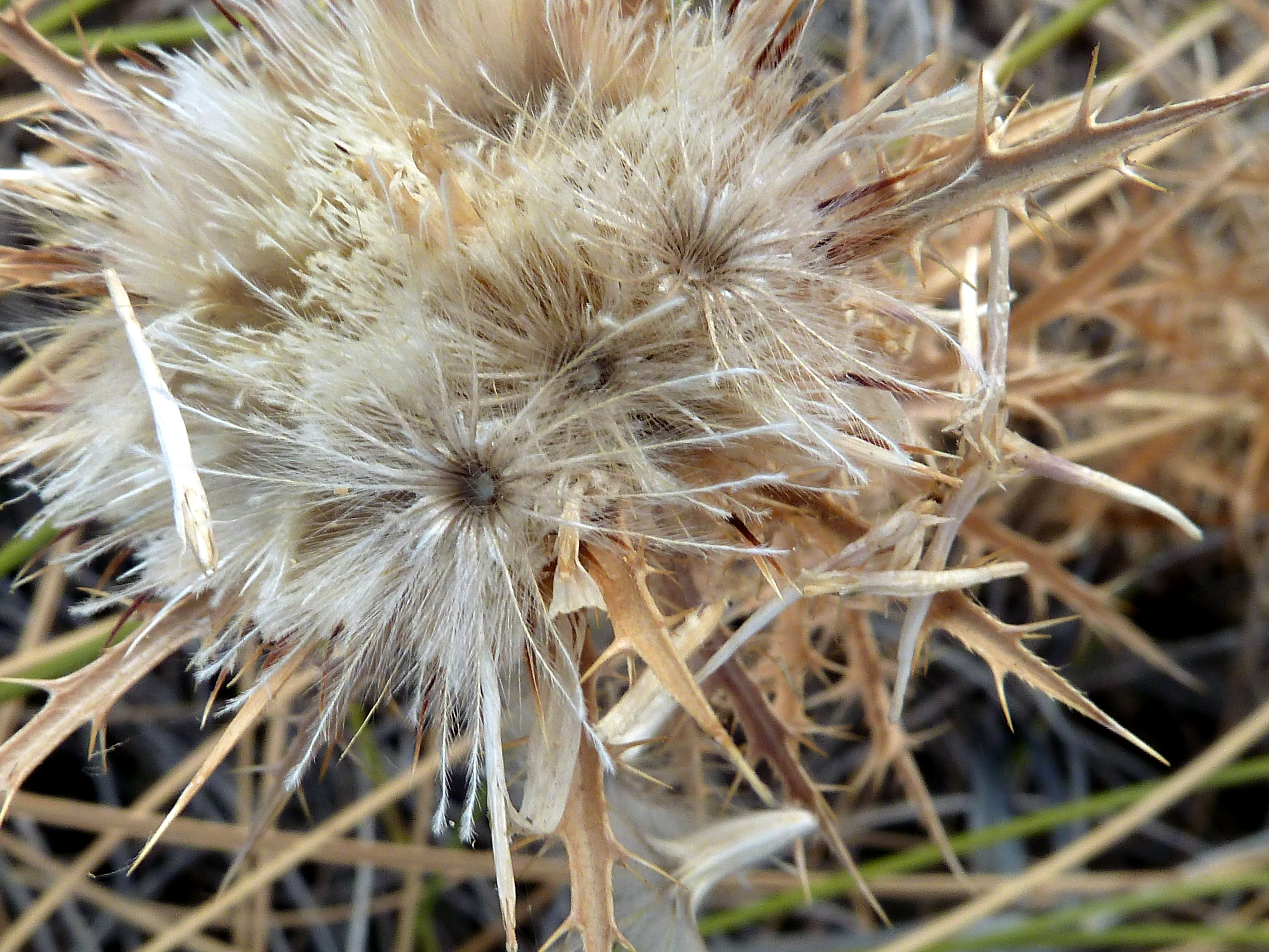 Atractylis humilis - Capítulo post-antesis con cipselas in situ . - circa Punto Limpio al Este del Polígono 'El Labradorcico', Águilas (Provincia de Murcia, España).